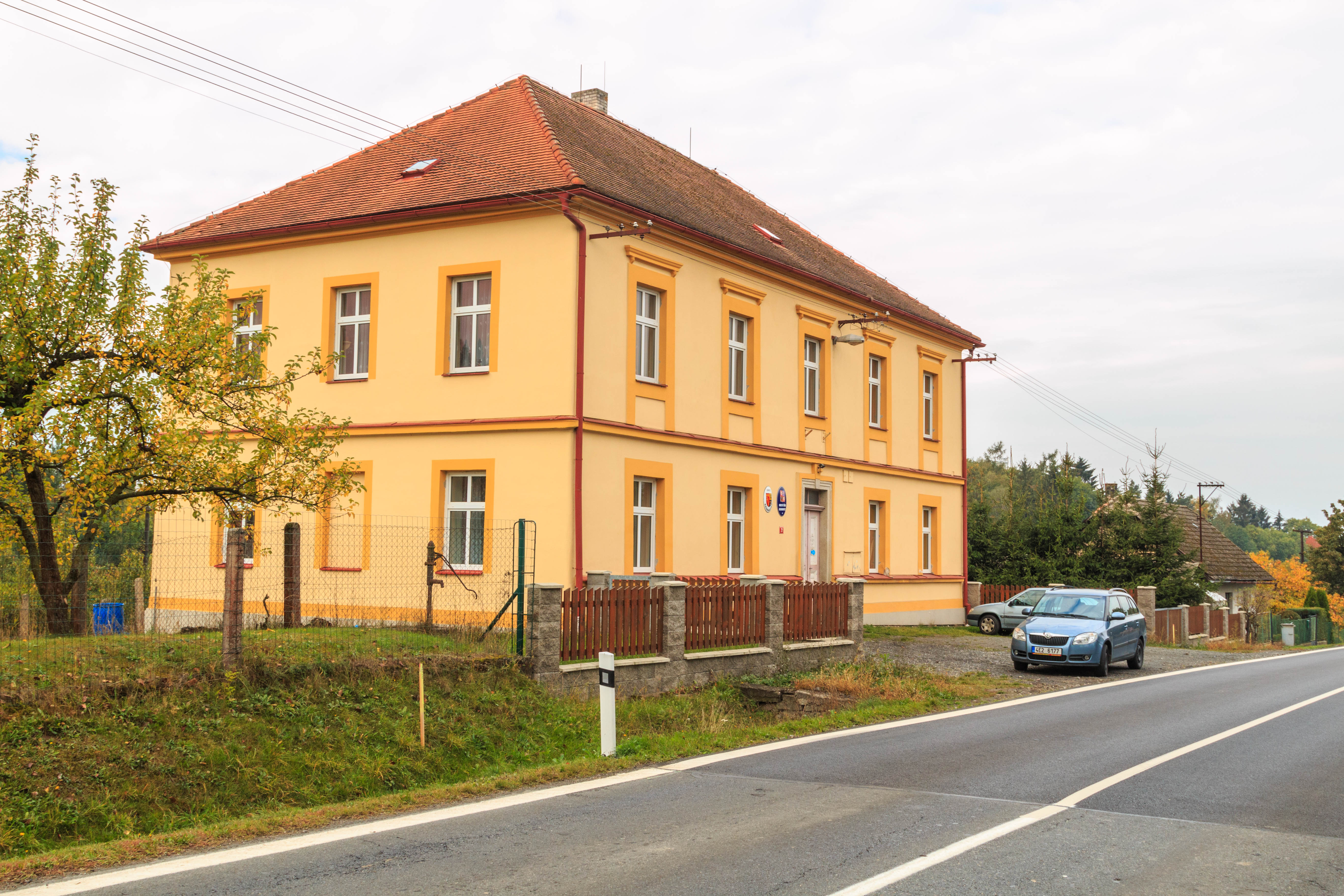 Kraborovice obecní úřad